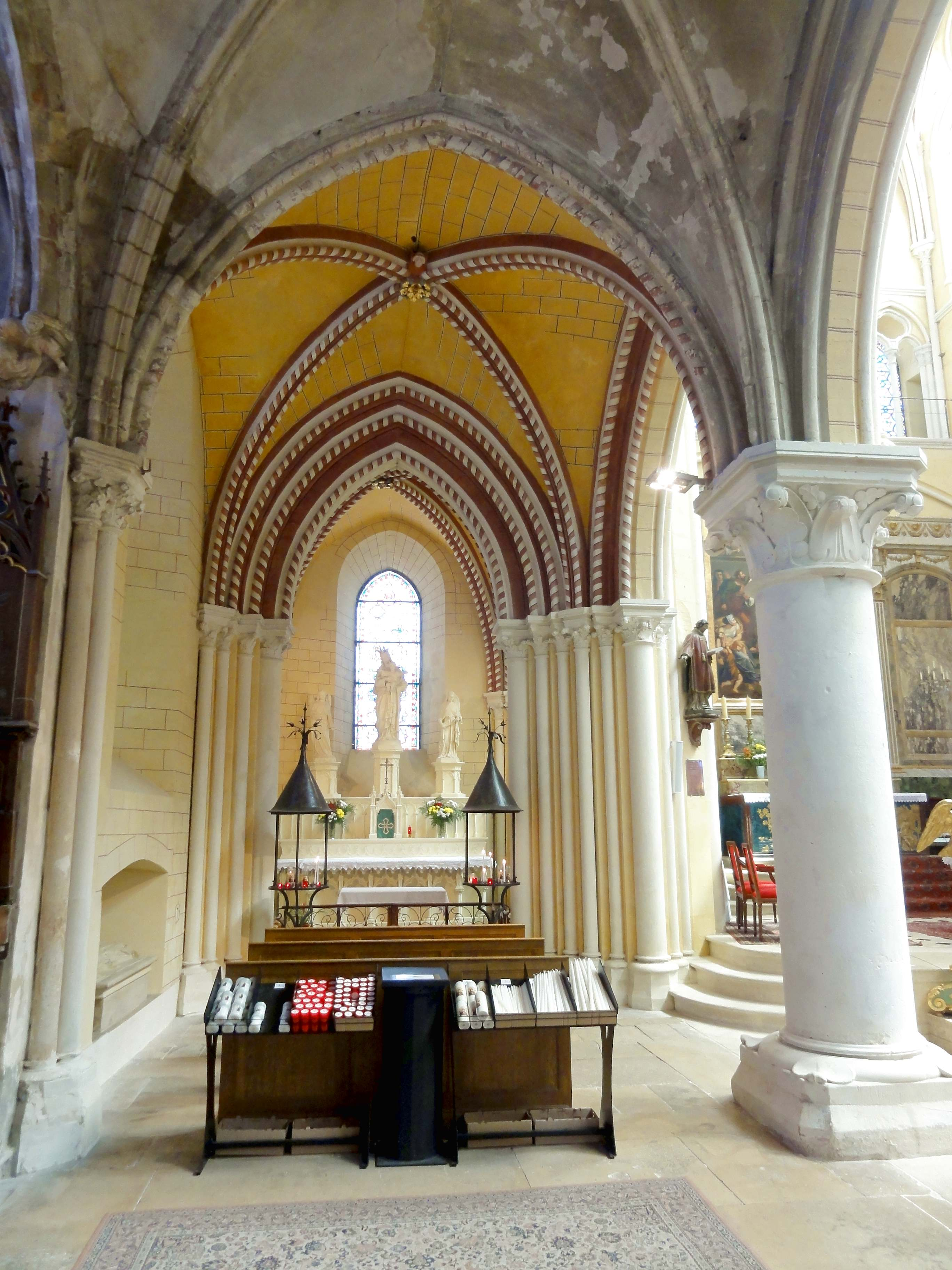 Voir titre.